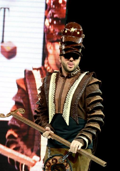 Helmut Fritz au défilé de mode du salon du chocolat.